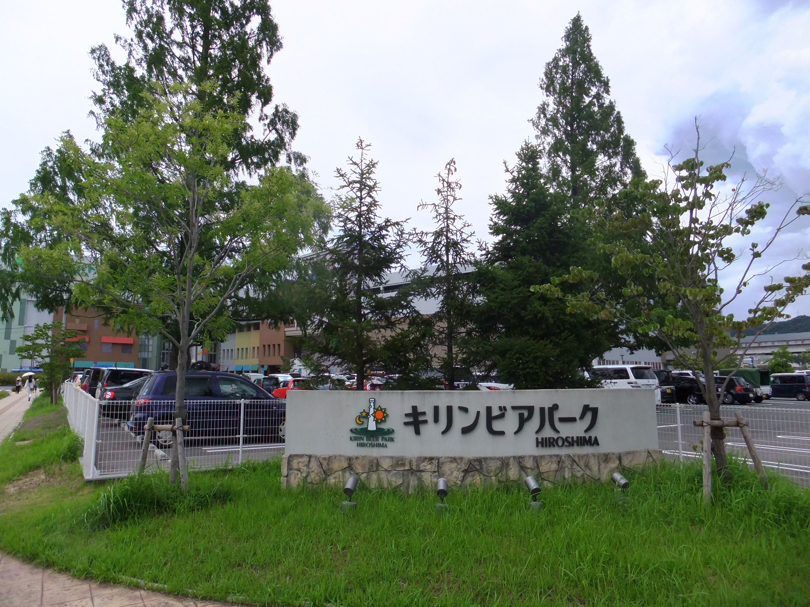 キリンビアパーク広島